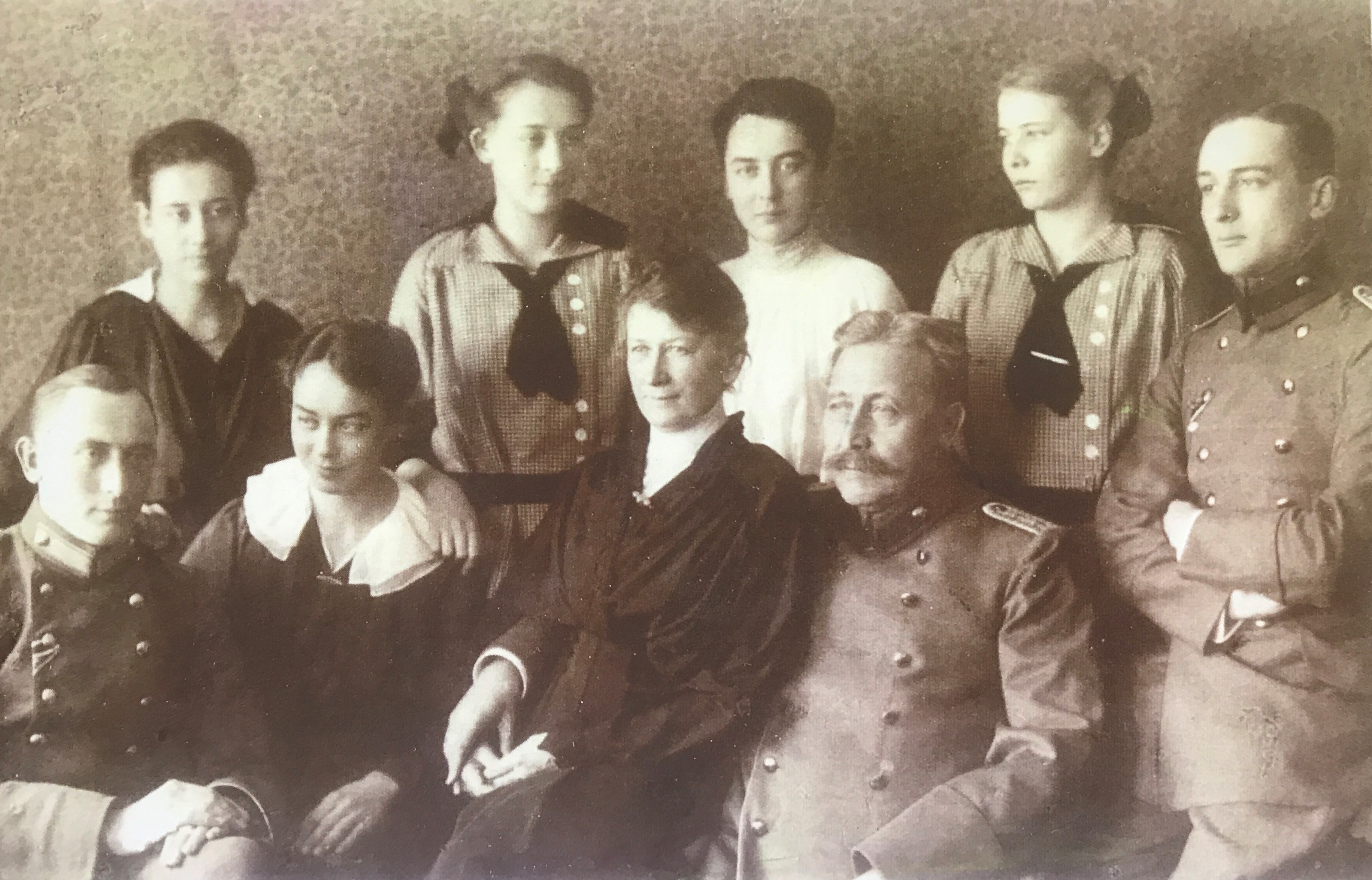 Gustav Jung der Jüngere mit seiner Frau, den fünf Töchtern und den zwei Söhnen